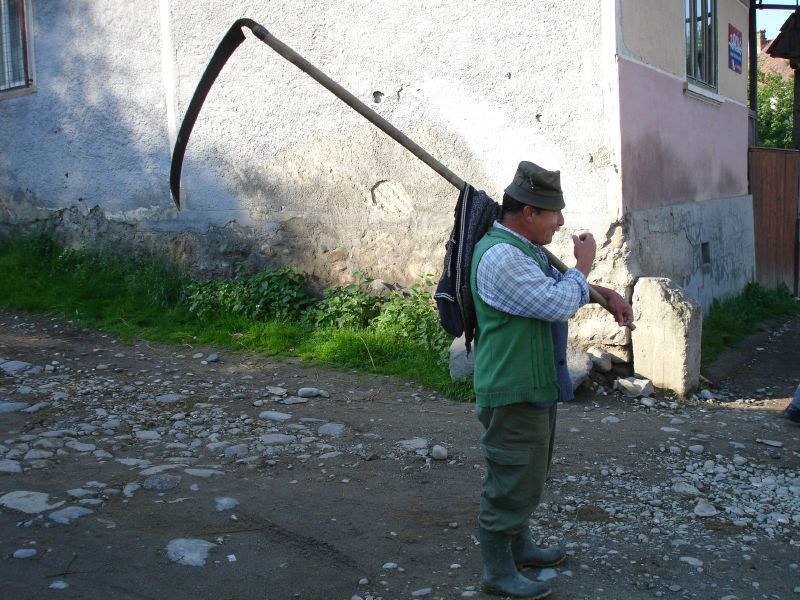 17 june 2005, Transylvania, Rumania